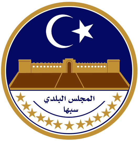 شعار المجلس البلدي سبها